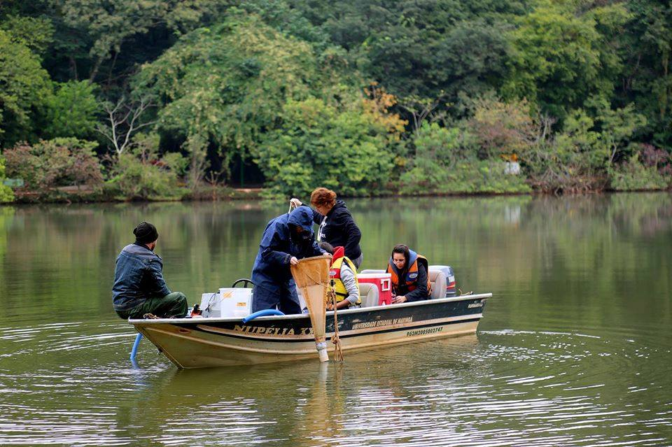 Coleta para pesquisa de limnologia no Parque do Ingá